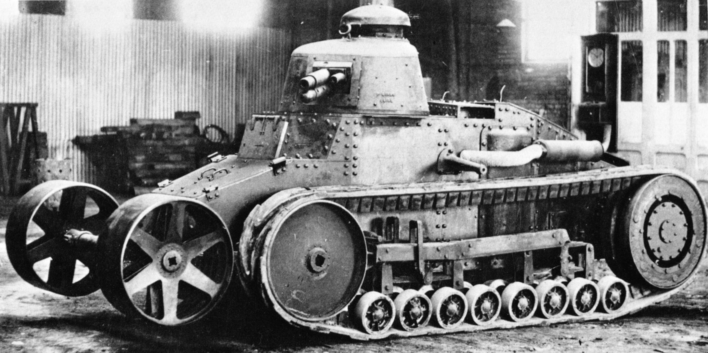 Digitale reproductie foto van het prototype van de NC2 tank